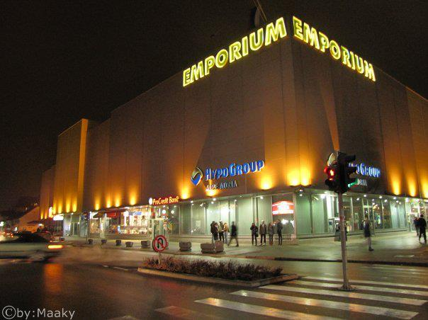 Obchodní centrum Emporium ve městě Bijeljina, BiH